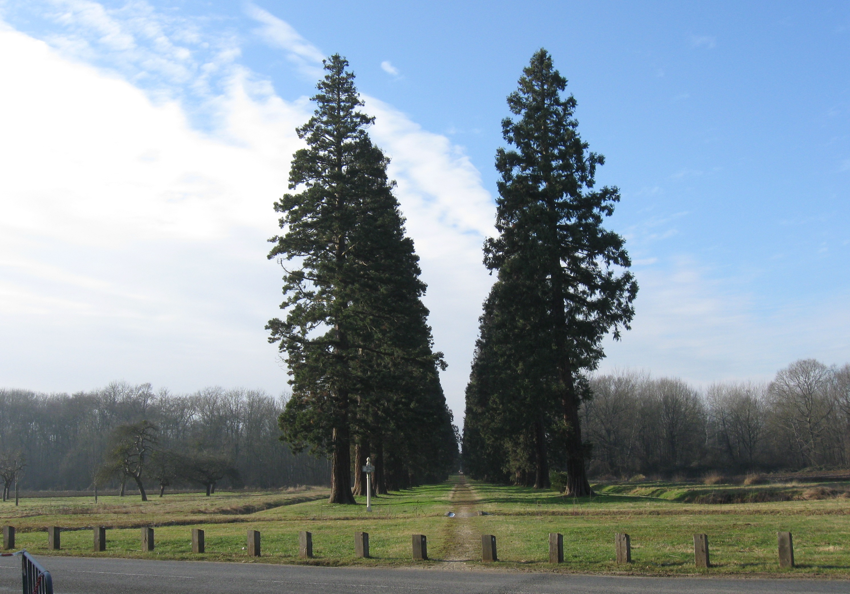 Allée des Séquoias (forêt de Ferrières). (Seine-et-Marne, région Île-de-France).